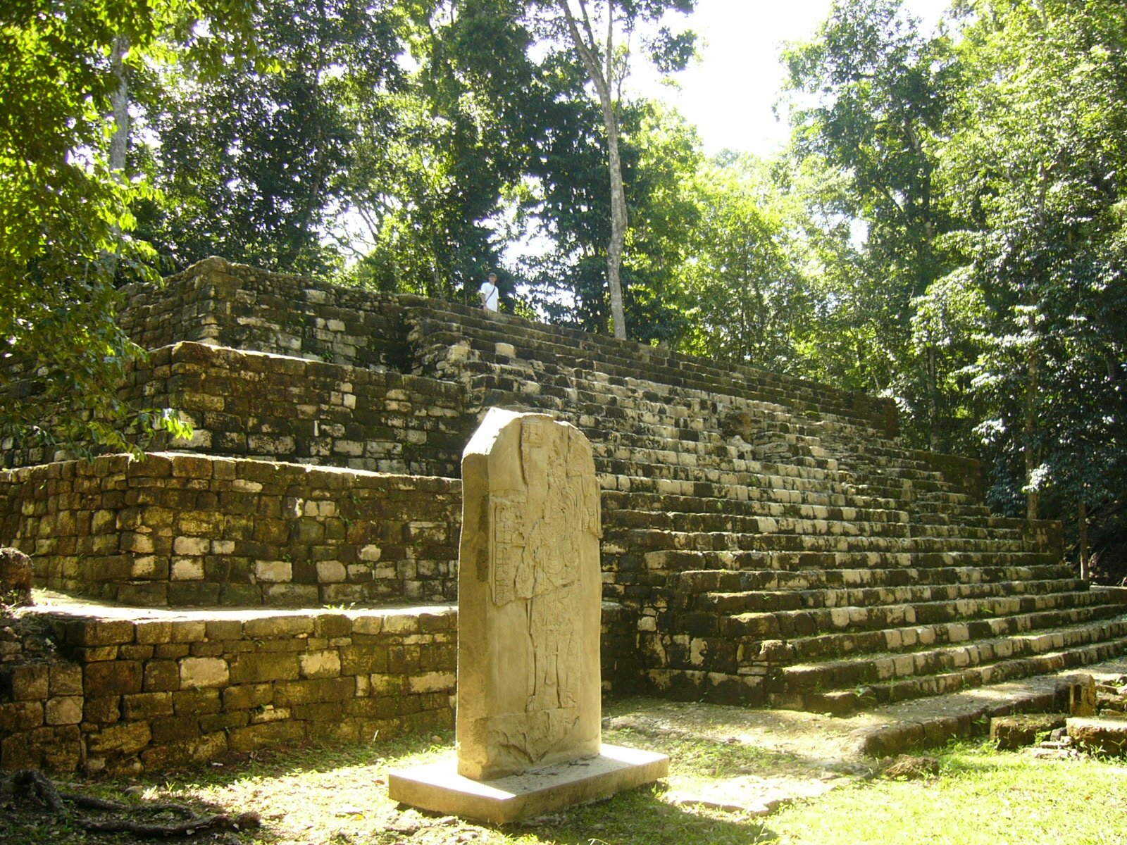 Agauteca temple plaza 18.10.2006